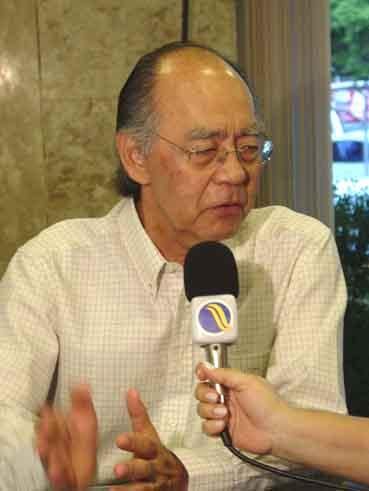 O psicólogo e autor de livros de auto-ajuda brasileiro Içami Tiba.